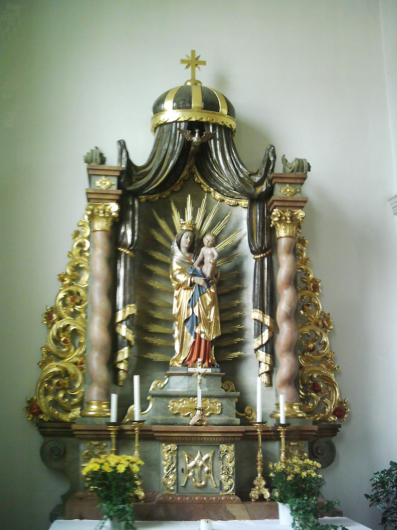 Römisch-katholische Pfarrkirche St. Petrus in Ketten in Haslach, Teilort von 88430 Rot an der Rot, Landkreis Biberach